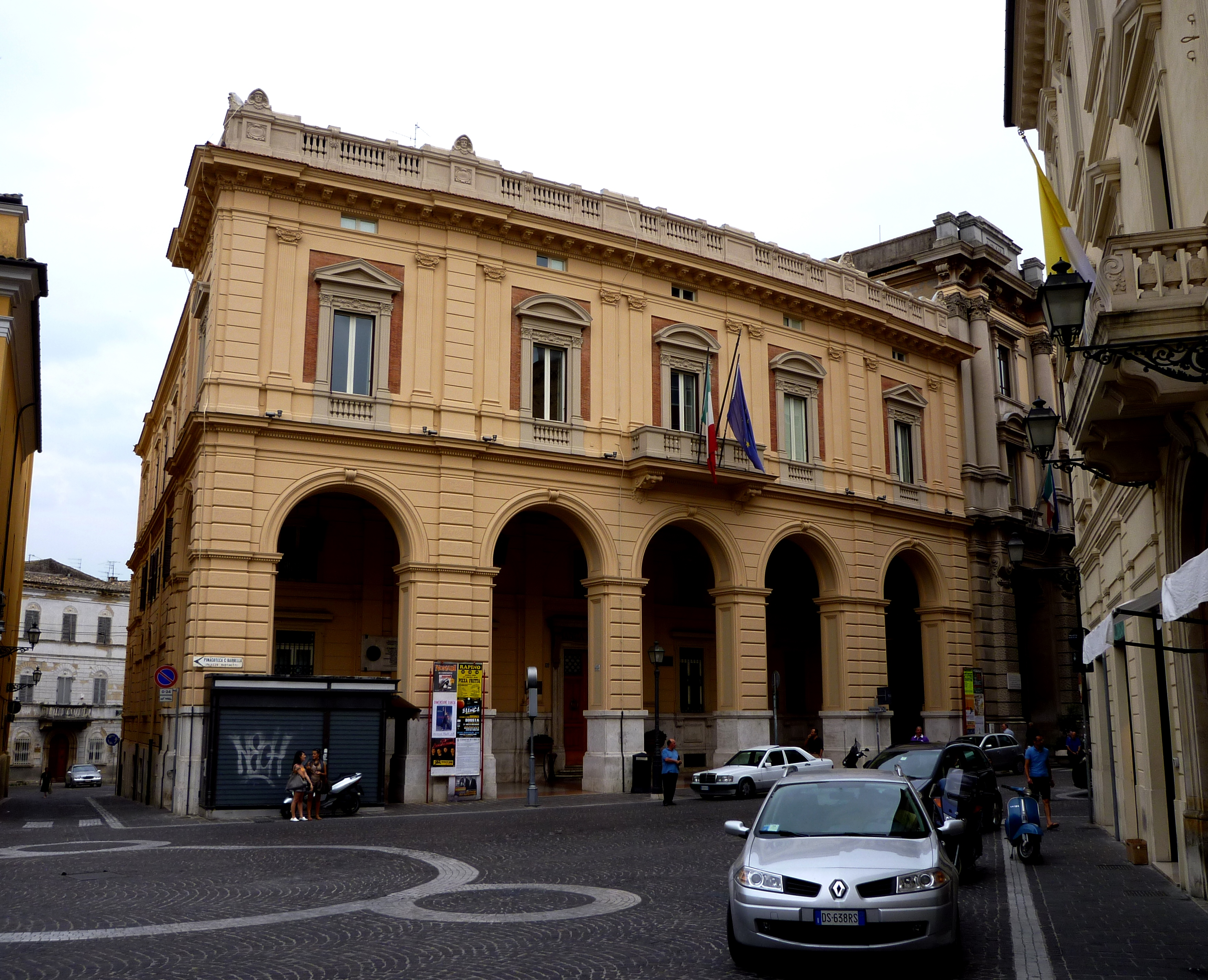 Facciata del palazzo della Banca d'Italia, Chieti.